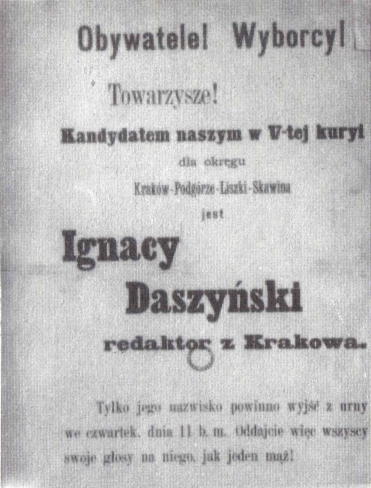 Ulotka wyborcza Ignacego Daszyńskiego (1866-1936).